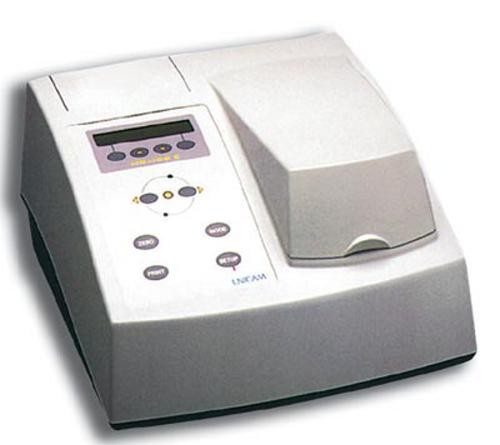 Spektrofotometer